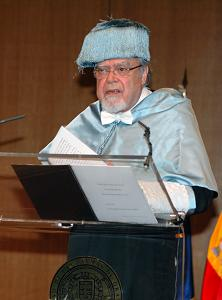 El compositor Juan José Falcón Sanabria investido doctor honoris causa por Universidad de Las Palmas de Gran Canaria.